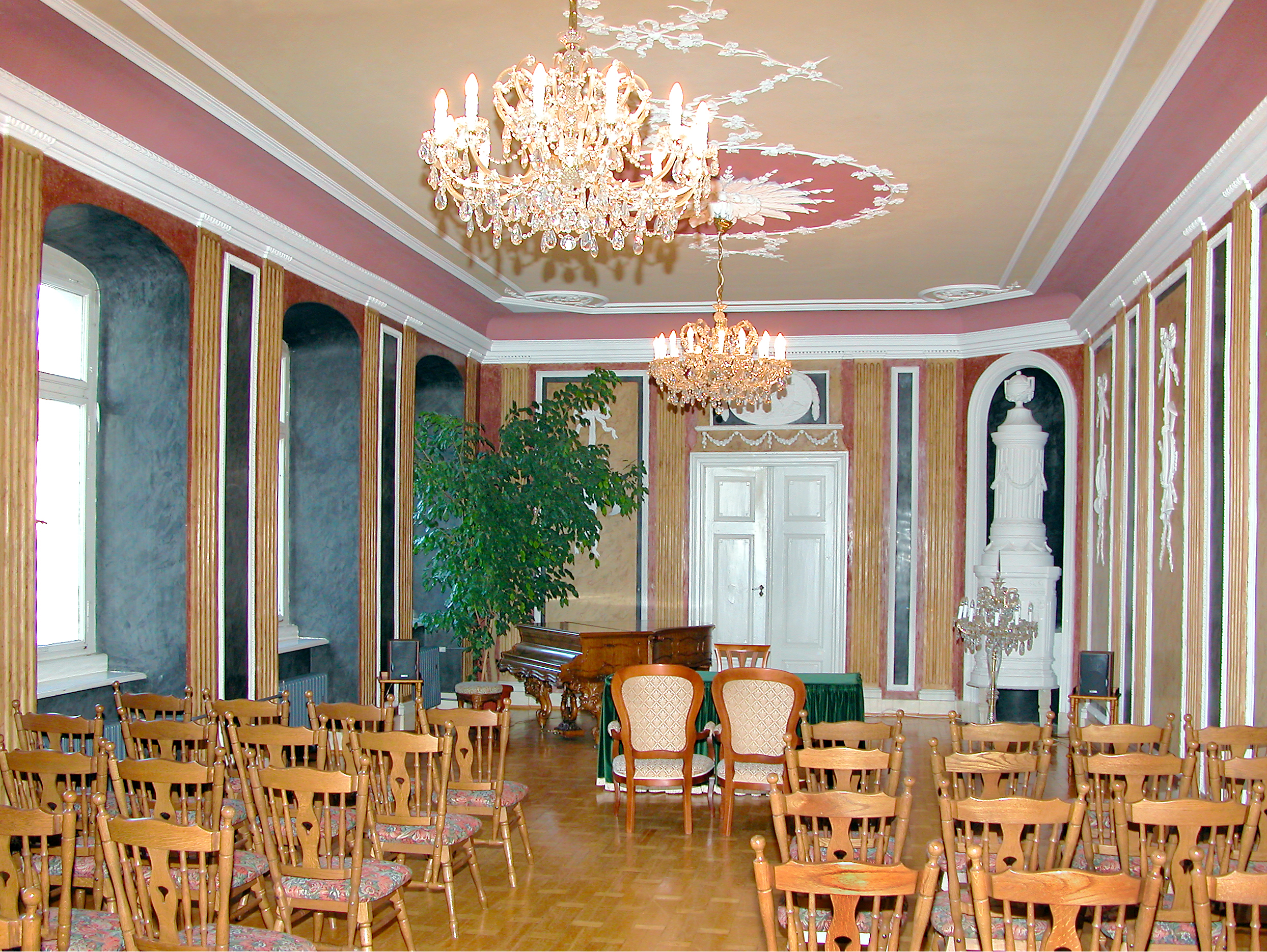 15.10.2007 08539 Leubnitz (Rosenbach), Am Park 1: Schloß, 1794 unter Heinrich Wilhelm von Kospoth im spätbarock-frühklassizistischen Stil errichtet. Der "Weiße Saal" mit Wandgliederung aus farbigem Stuckmarmor im 1. Obergeschoß. [DSCN30692.TIF]20071015730DR.JPG(c)Blobelt